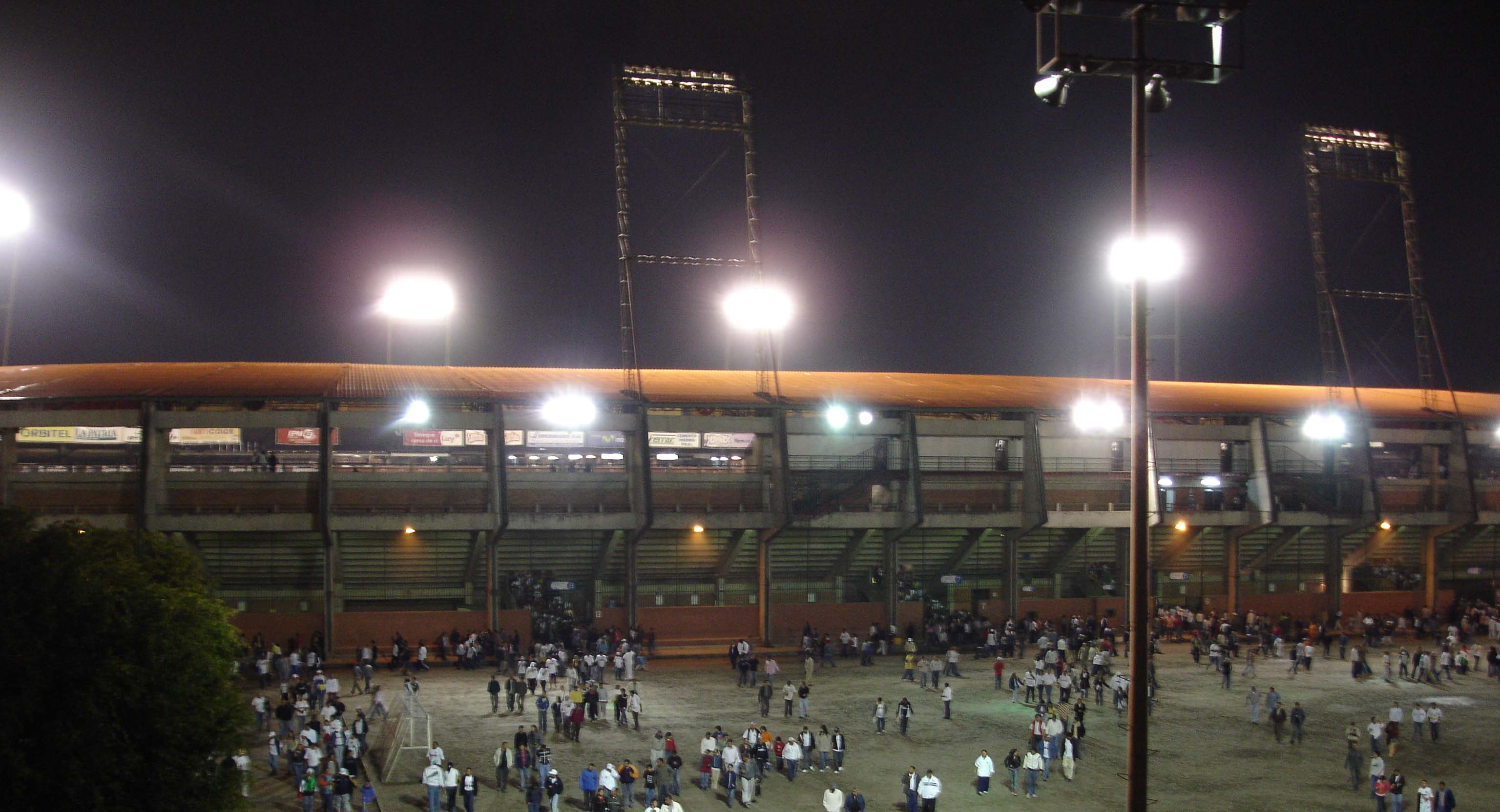 Vista externa del estadio Palogrande